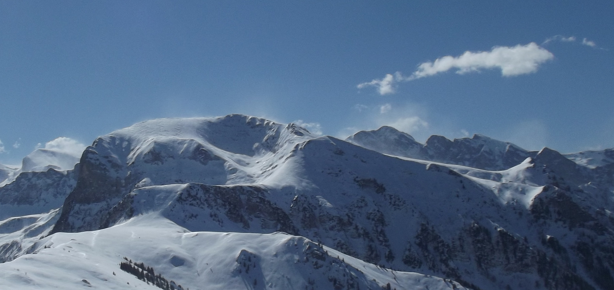 Il Marguareis visto dalla Cima Gardiola